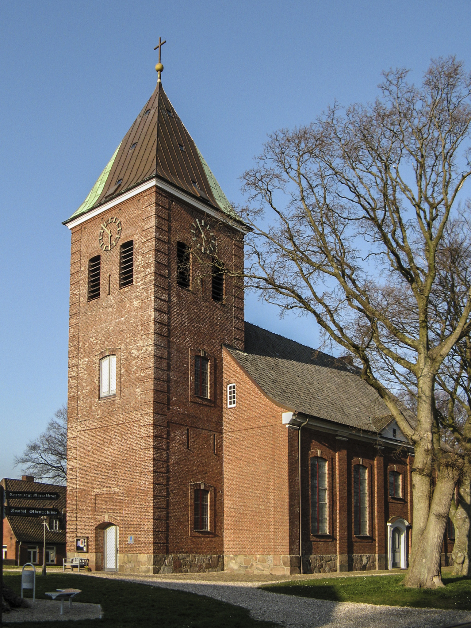 St. Nicolai-Kirche Wöhrden St. Nicolai church Wöhrden